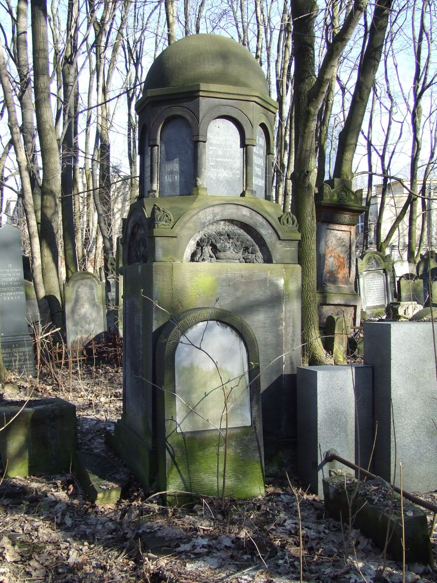 Cmentarz Żydowski na Powązkach, Warszawa, grób Magnusa Kryńskiego, nagrobek autorstwa Abrahama Ostrzegi